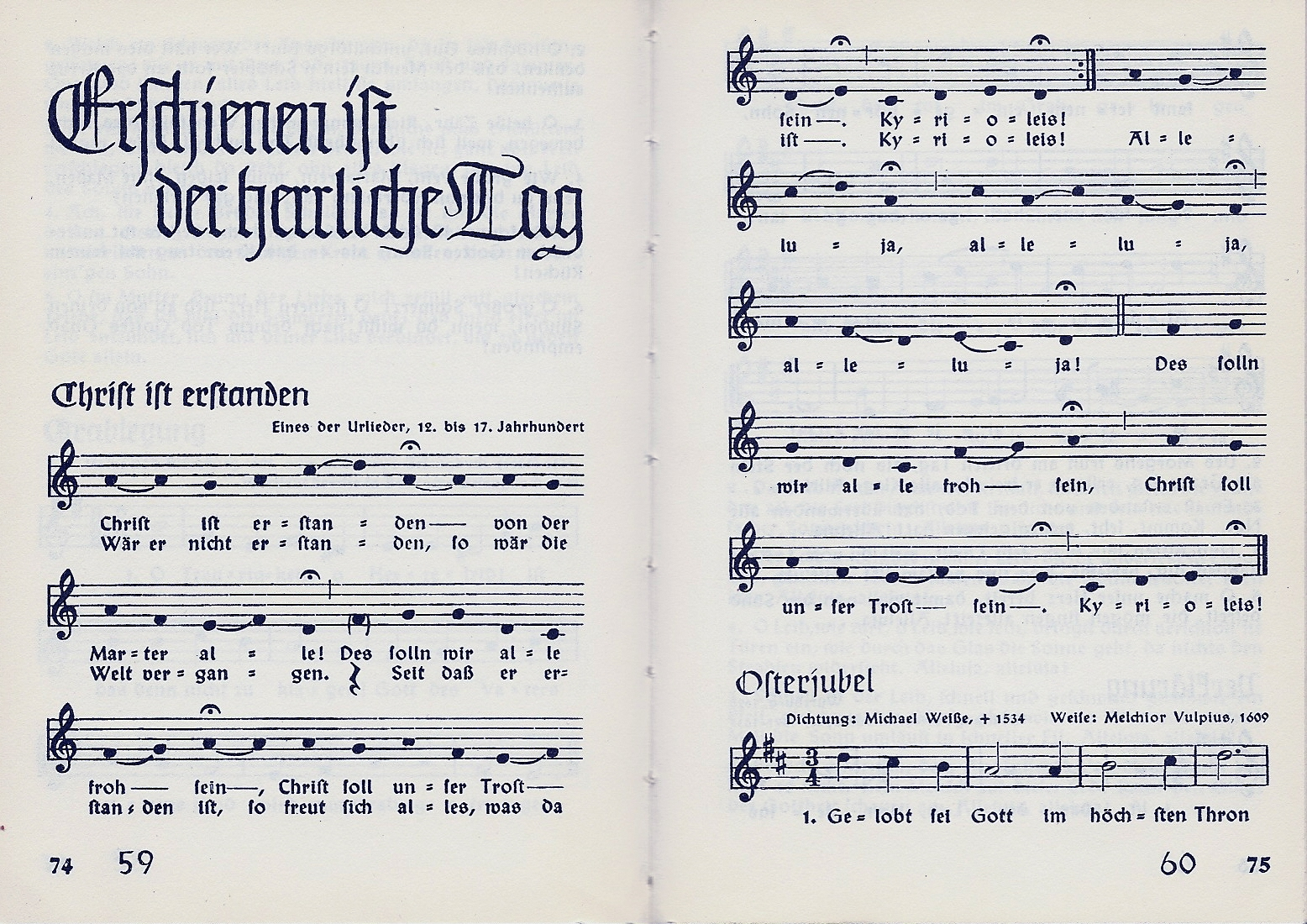 Kirchenlied. Eine Auslese geistlicher Lieder, Düsseldorf 1938 (Hrsg.: Josef Diewald, Adolf Lohmann, Georg Thurmair. Buchschmuck: Alfred Riedel) - hier Nr. 59: "Christ ist erstanden" aus der Notenausgabe W 1 1957 (Christophorus-Verlag Herder GmbH, Freiburg im Breisgau)